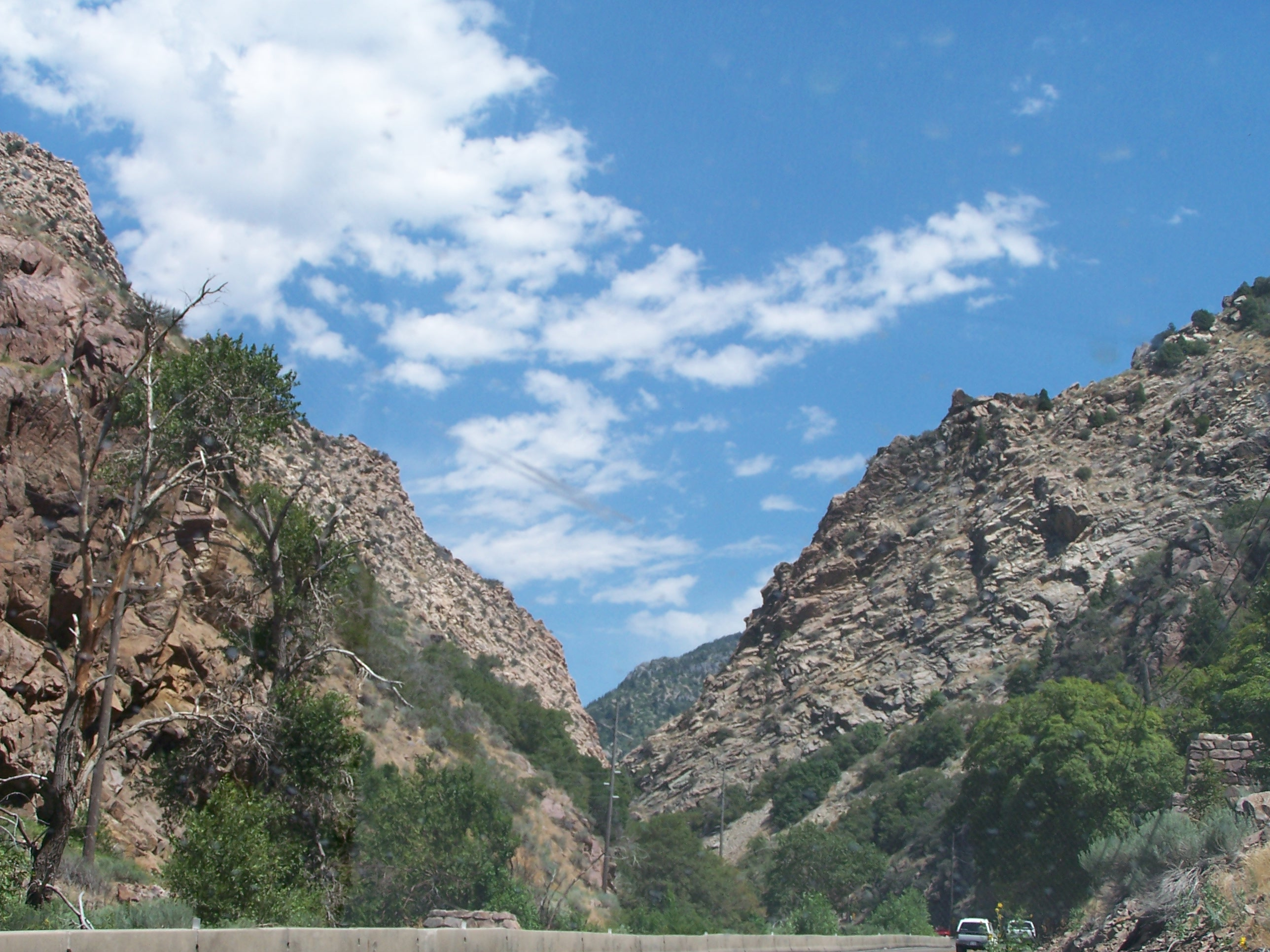 Ogden Canyon Utah